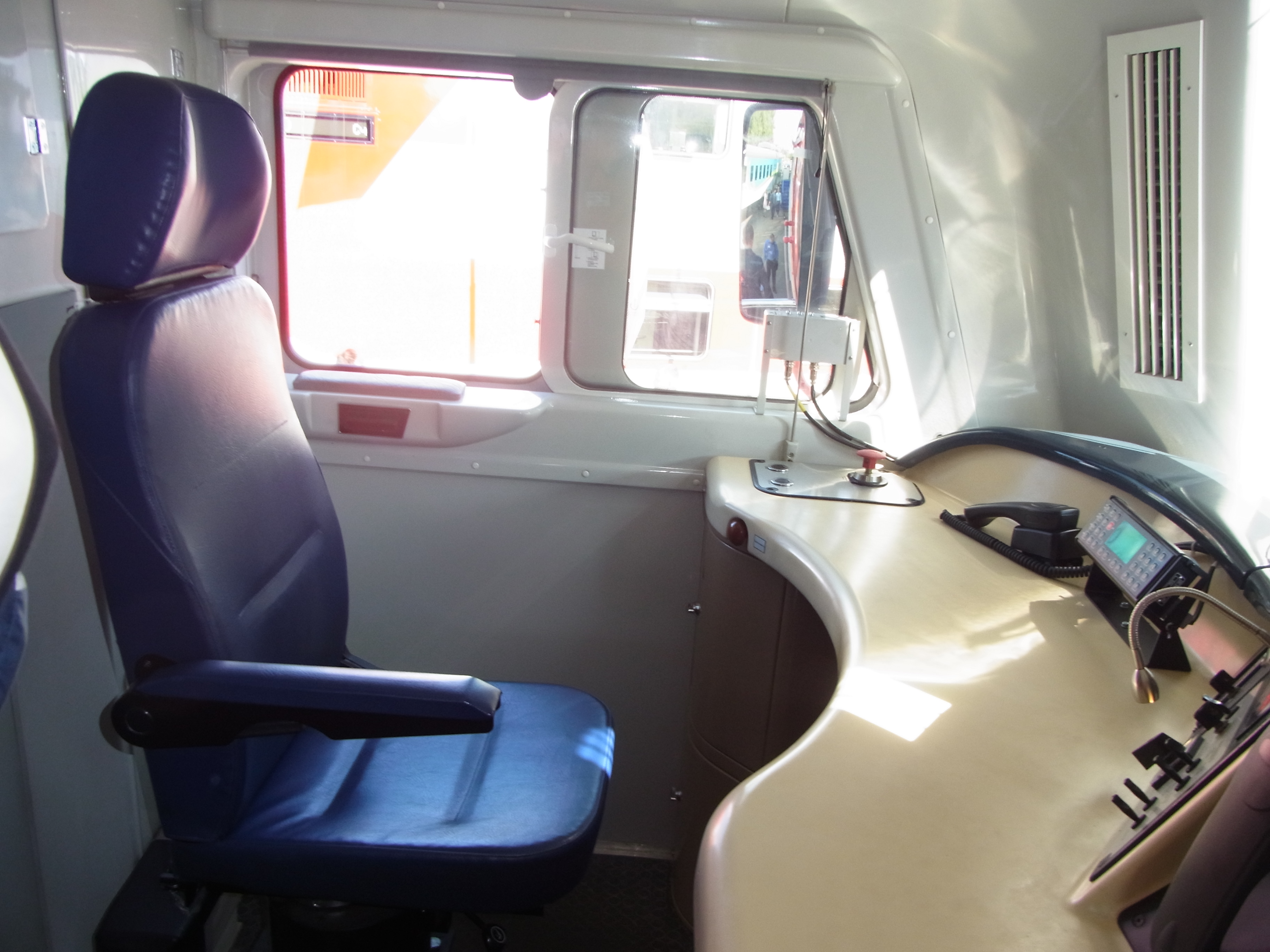 Кабина машиниста тепловоза 3ТЭ25К2М-0001. Кресло помощника машиниста